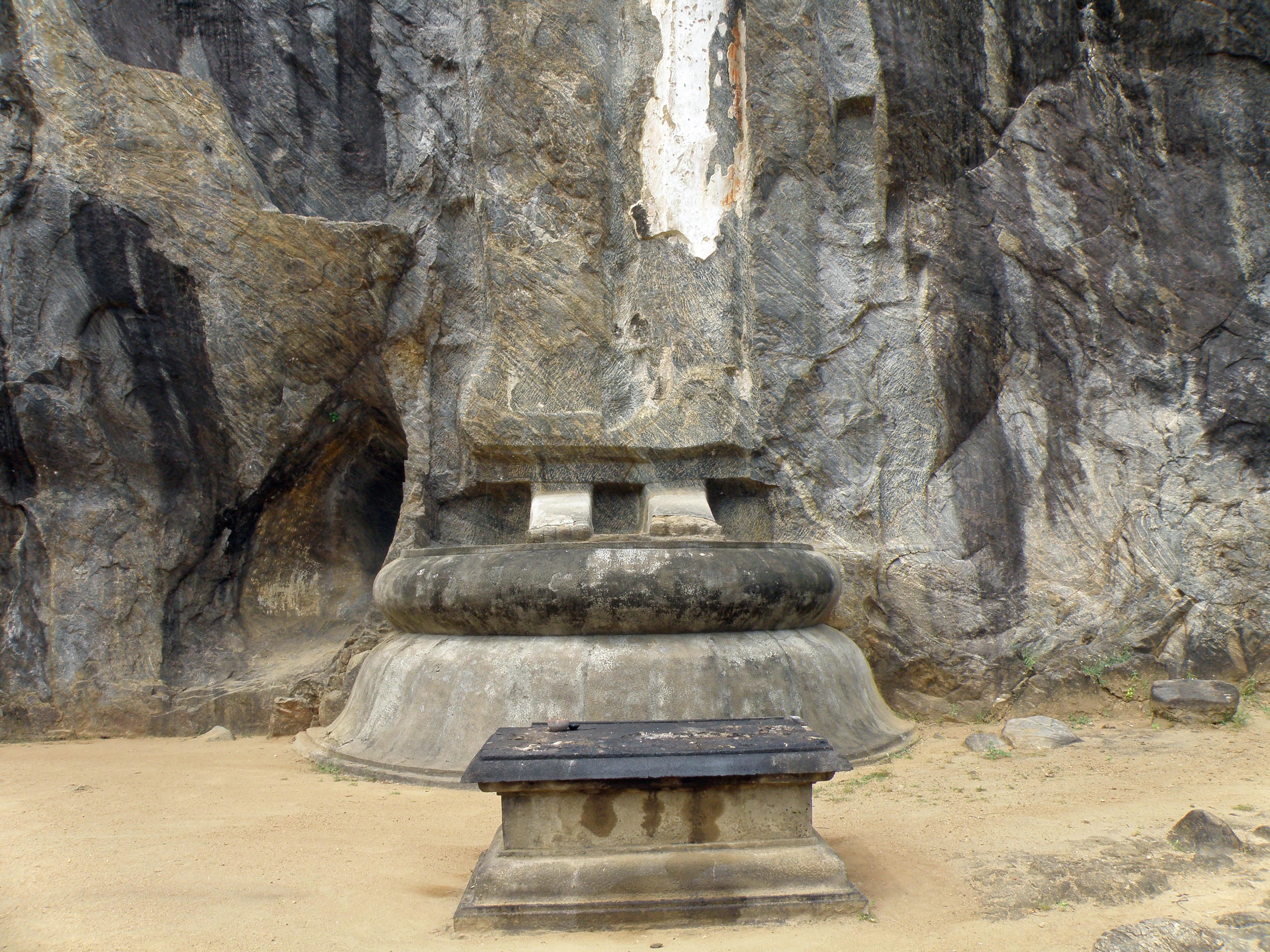 Le trône en forme de lotus et à droite la "lampe à l'huile de moutarde"